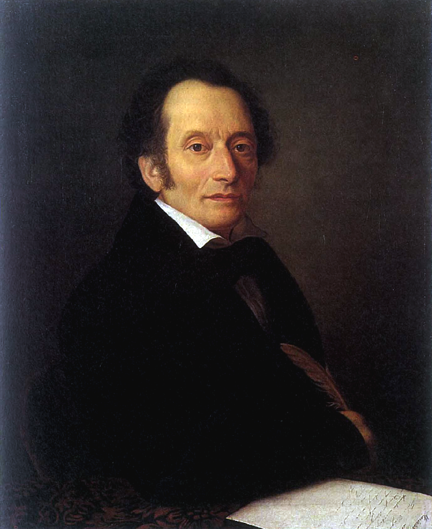 Portrait von Christian Brentano